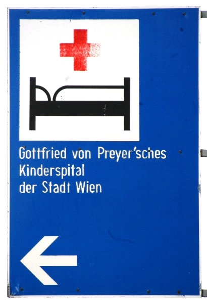 Gottfried von Preyer´sches Kinderspital in Wien-Favoriten